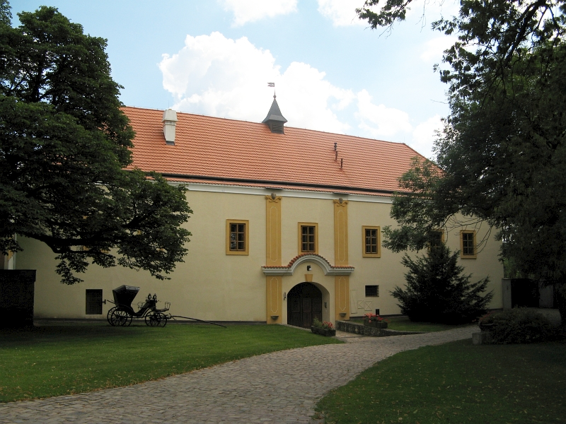 Tvrz, Třebotov 1, Třebotov.